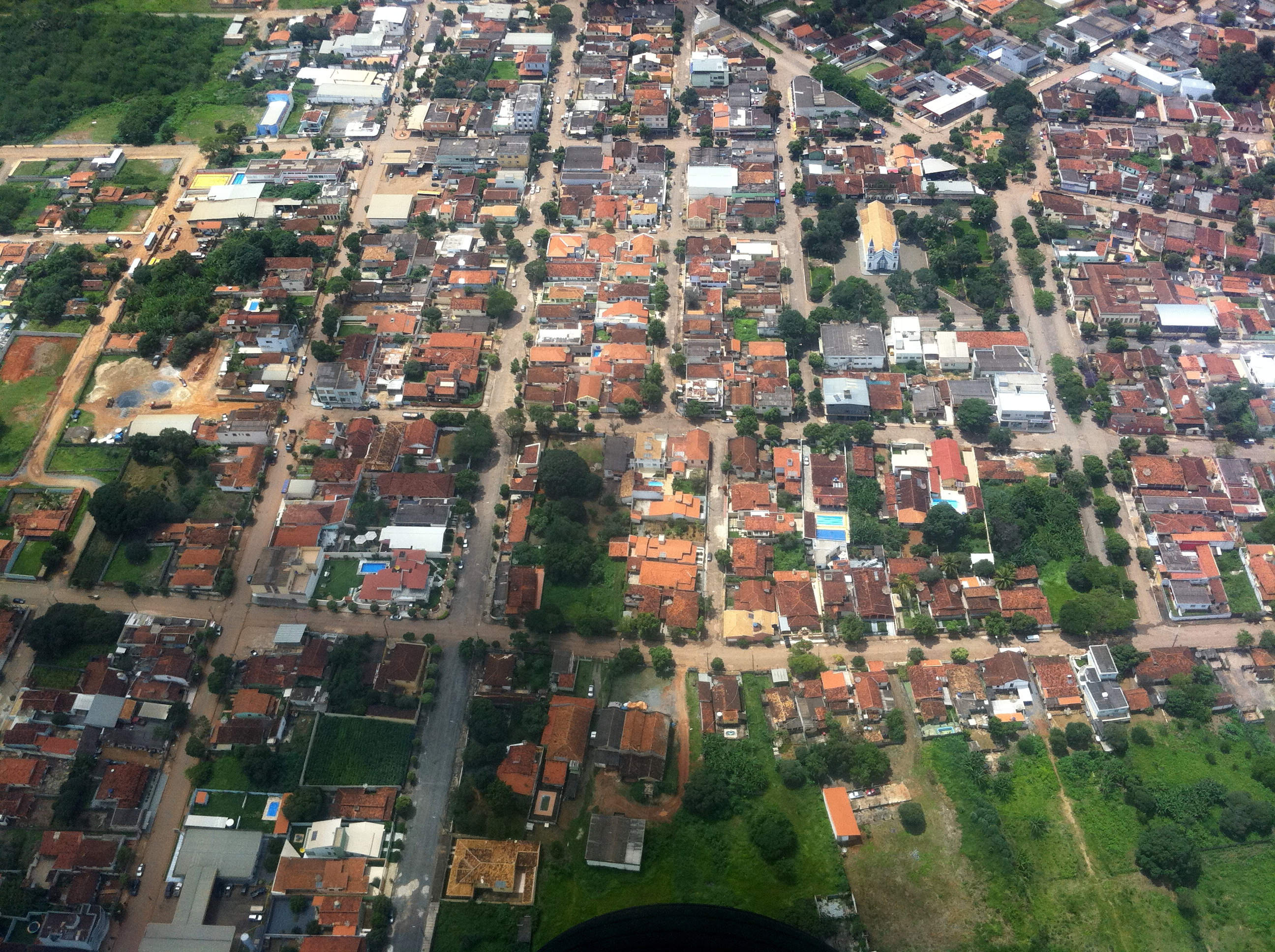 Imagem aérea com vista para parte da área central de Pompéu-MG, ano de 2012. Imagem mostra em primeiro plano parte da Rua Padre João Porto, próximo do cruzamento com a Av. Capitão Joaquim Antônio até o cruzamento com a rua Antônio Lacerda. Temos também vista da Igreja Matriz, rua Dona Joaquina e praça Leonardo Campos